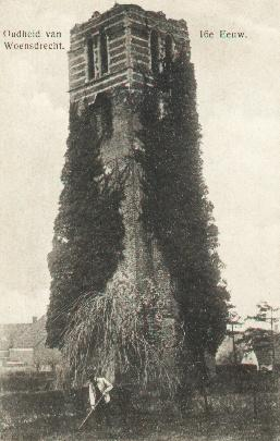 De Stompe Toren in Woensdrecht, gebouwd in de 16e eeuw, opgeblazen in 1944.